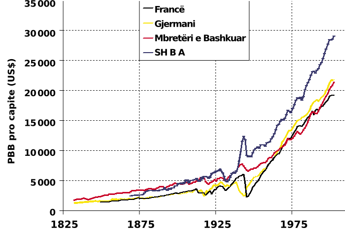 Niveli i pasurisë personale në Francë, Gjermani, Mbretëri e Bashkuar, SHBA